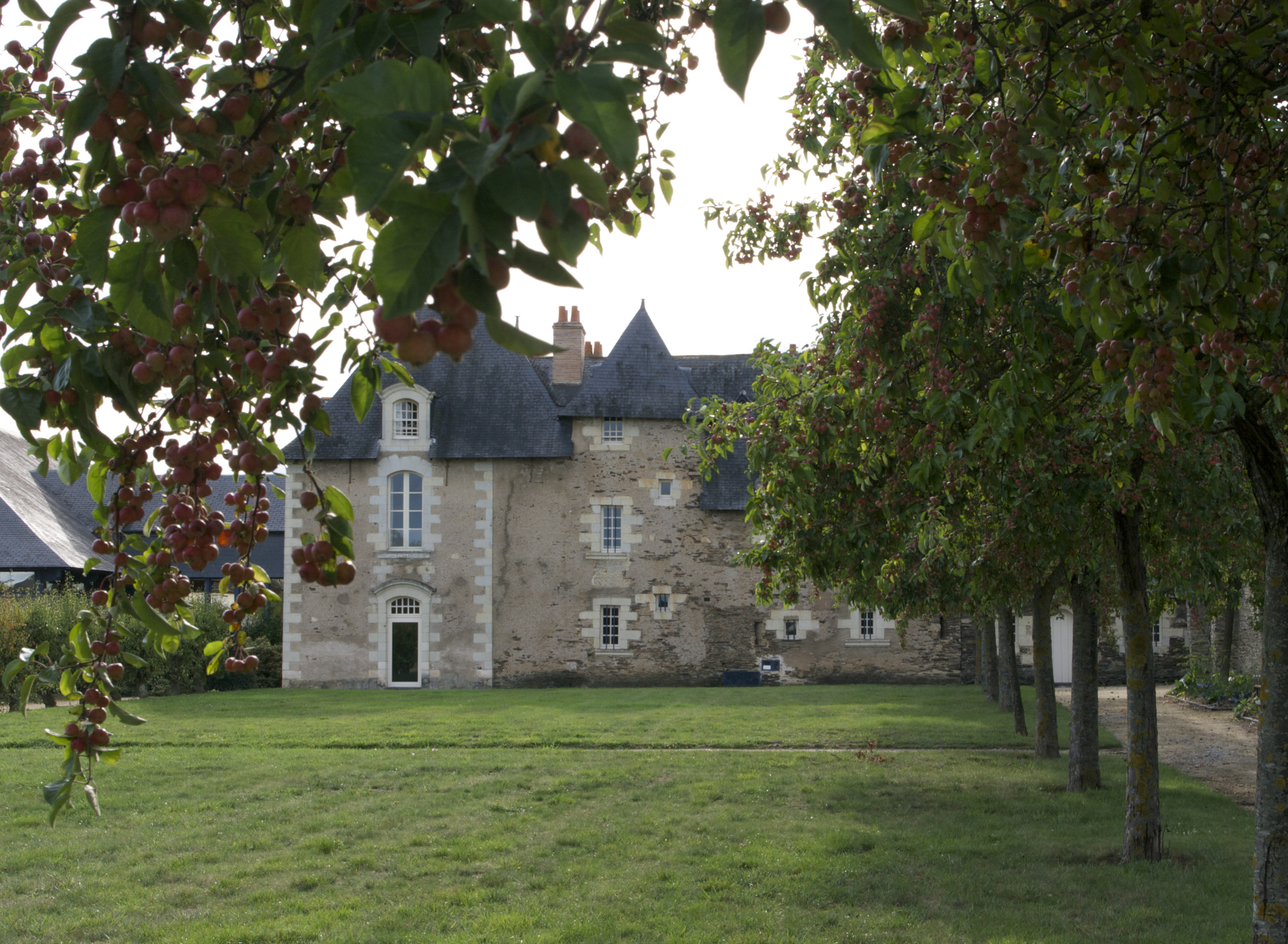 Manoir de la Ranloue, Saint-Barthélemy-d'Anjou .